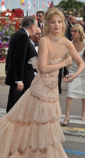 Arielle Dombasle au festival de Cannes